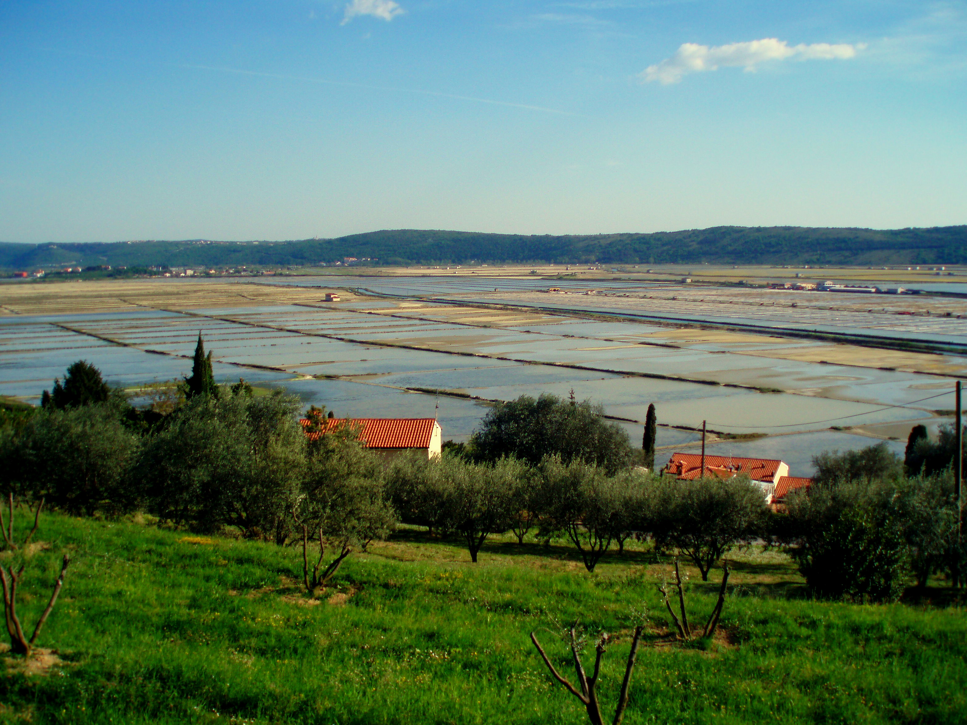 Portorose , Soline.